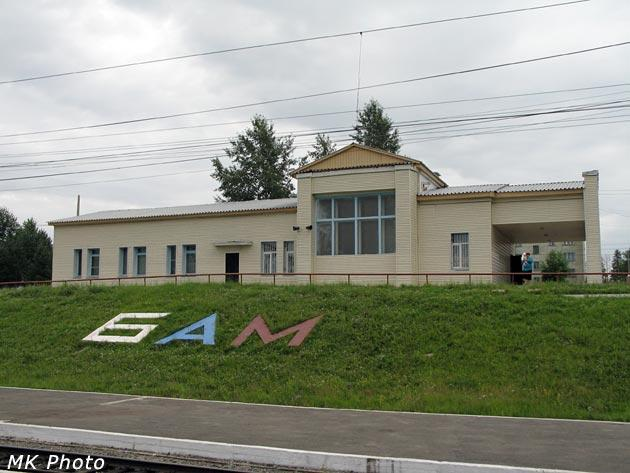 Железнодорожная станция Бамовская